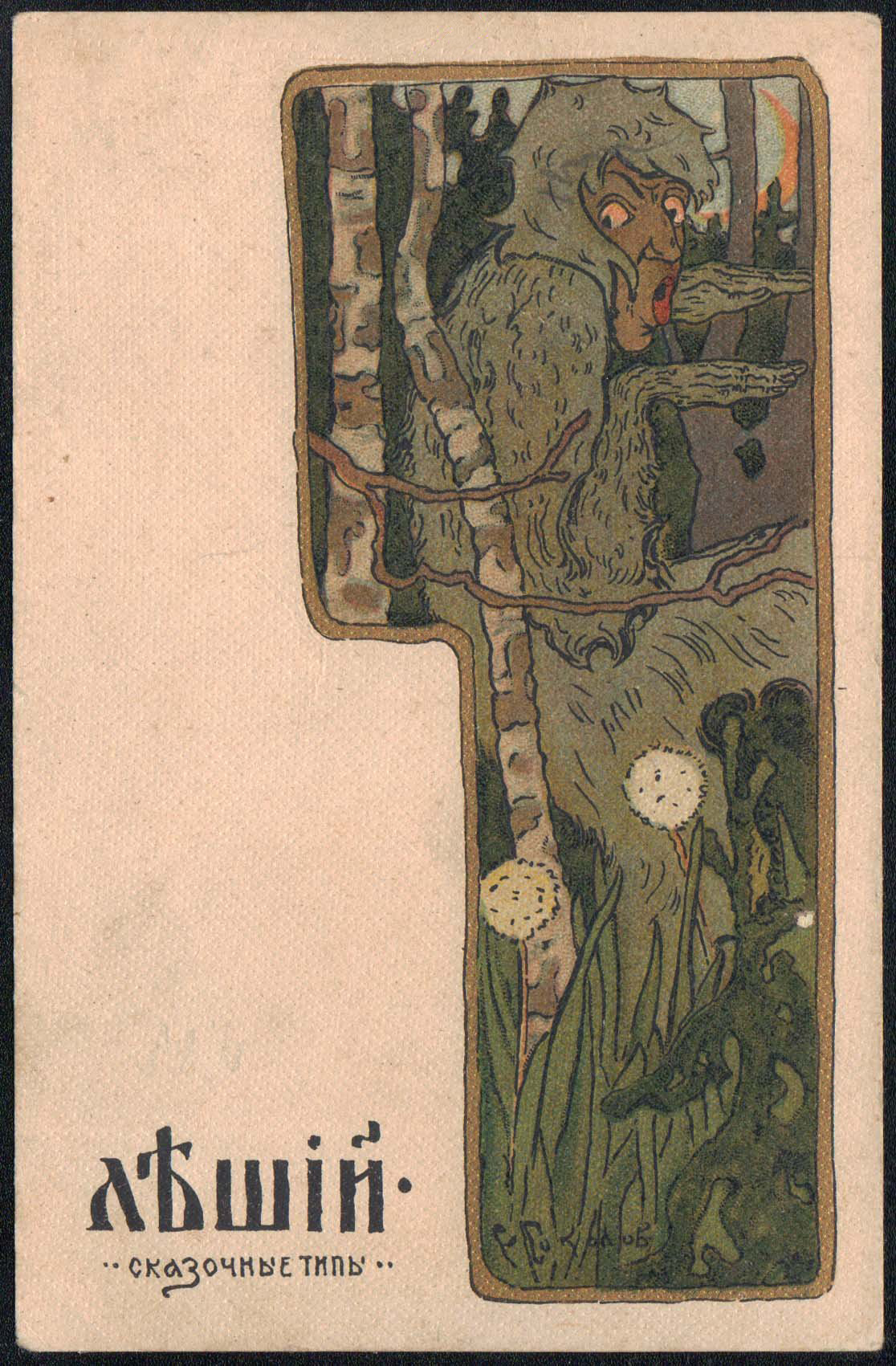 Евгений Соколов. Сказочные типы. Леший